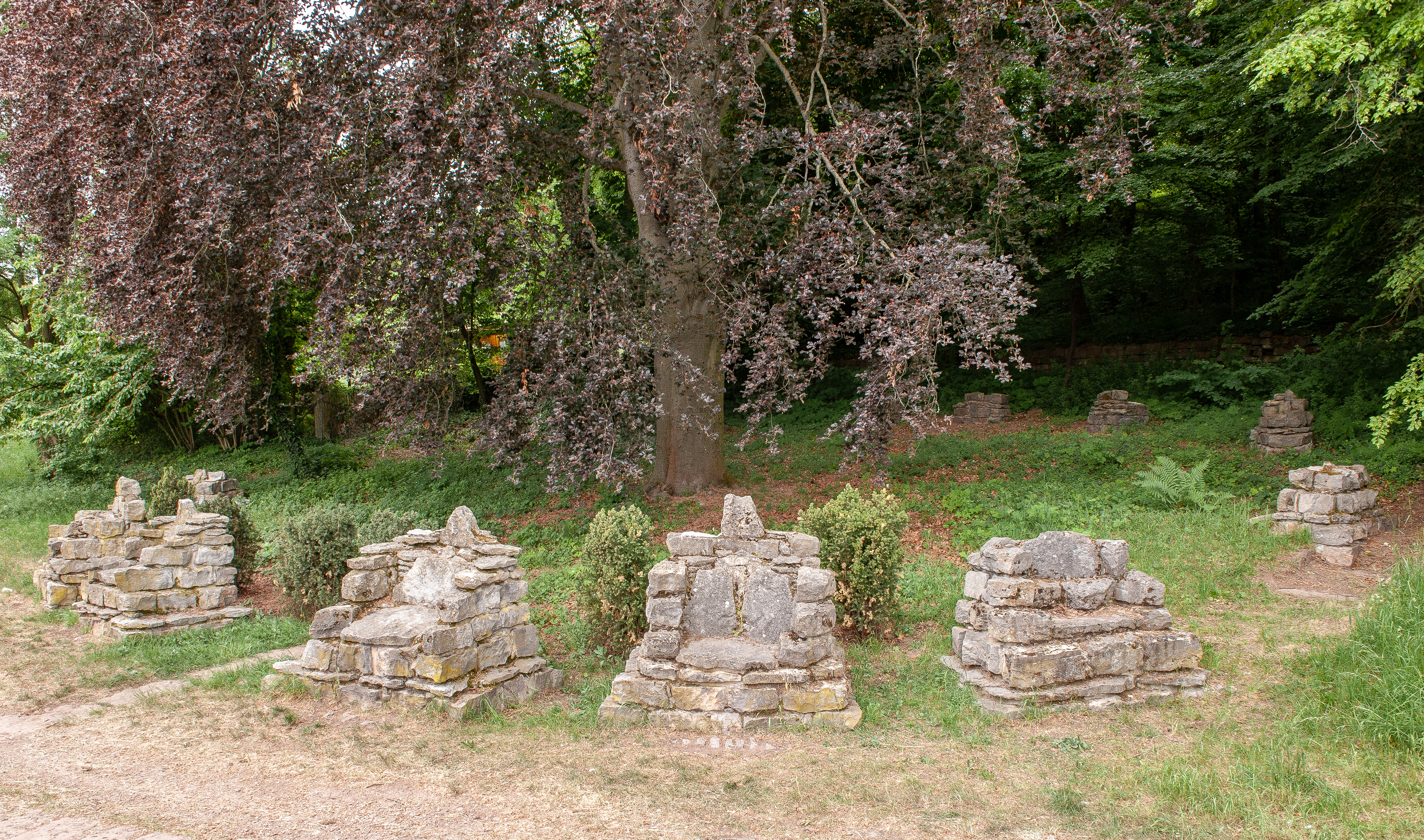 Kunststation "Bei der Buche" von Karina Raeck, Gelände der Internationalen Gartenbauausstellung 1993, Stuttgart